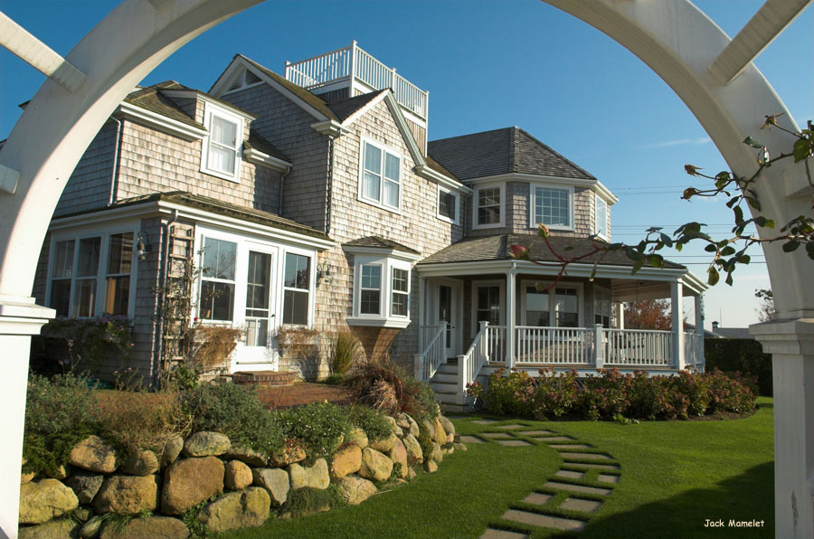 Nantucket garden own work Jack Mamelet 01/11/2006